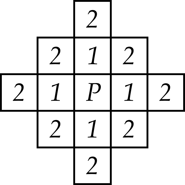 Manhattan-Nachbarschaft mit einem maximalen Abstand 2 um den Mittelpunkt P Manhattan-neighbourhood with a maximum distance 2 around the centre P